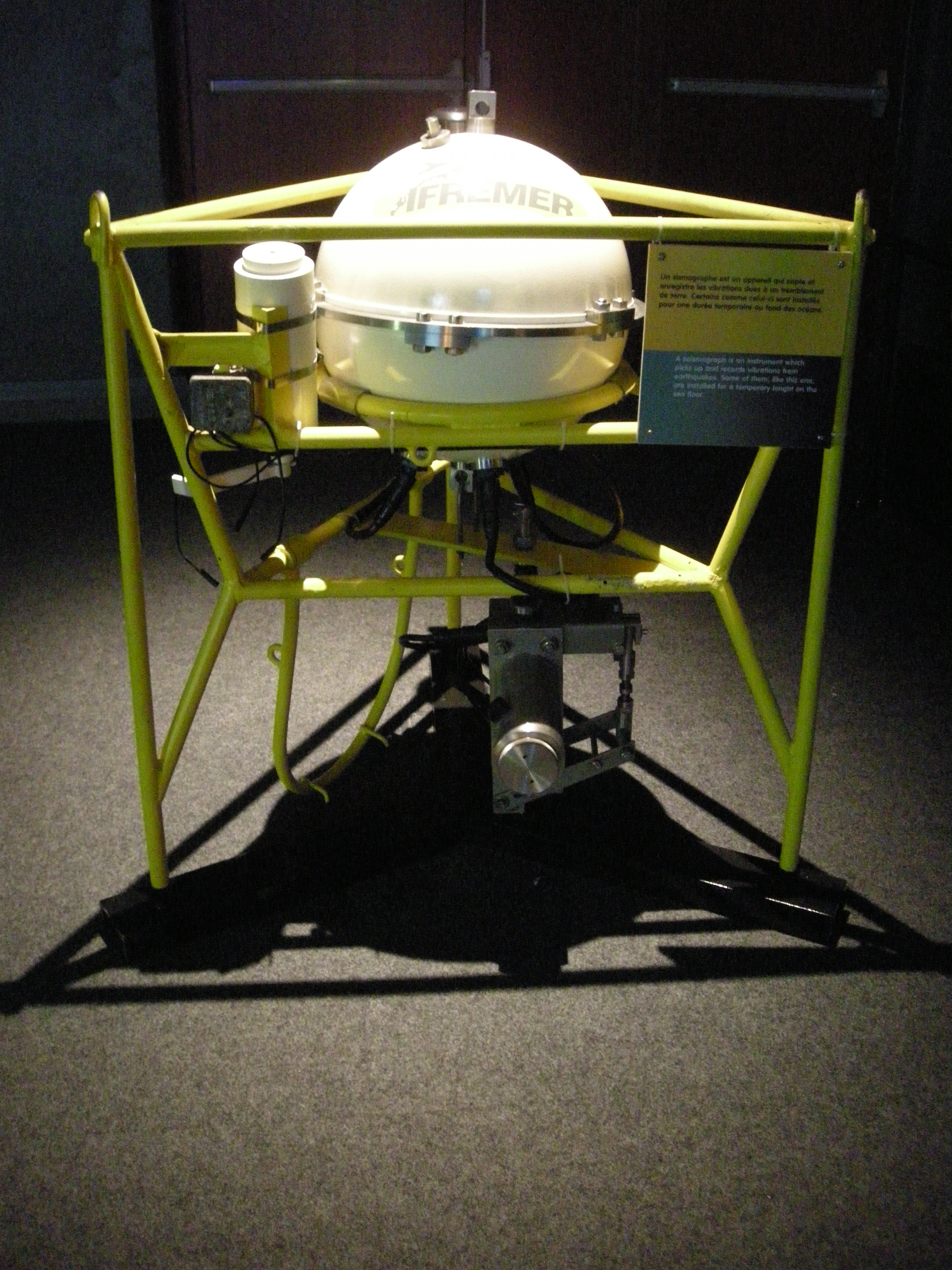 Sismographe IFREMER, pouvant être installé pour une durée temporaire au fond des océans. Présenté à la Cité de la Mer de Cherbourg, Normandie